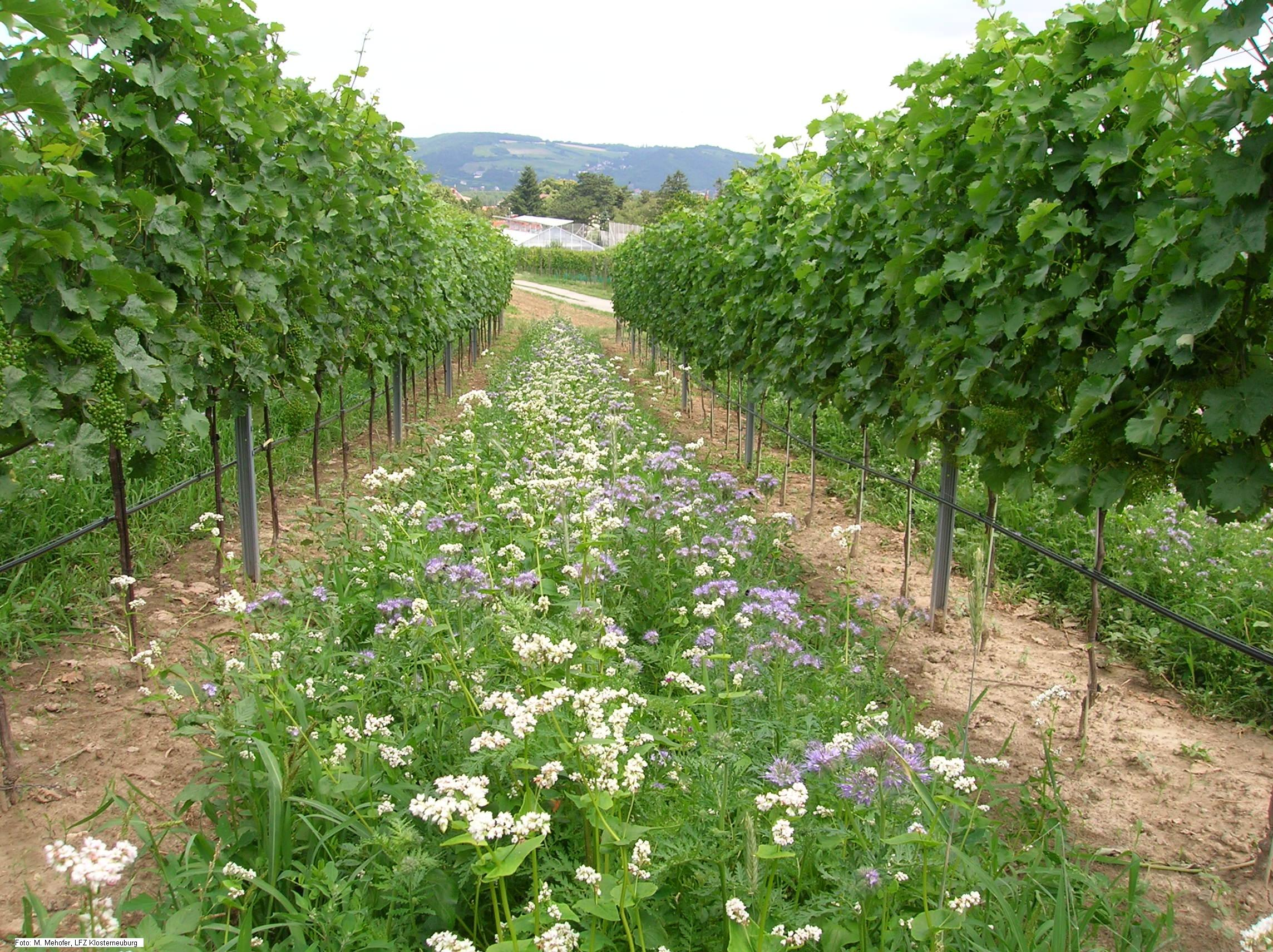 Artenreiche Begruenung einer Fahrgasse in einem organisch-biologisch bewirtschafteten Weingarten.